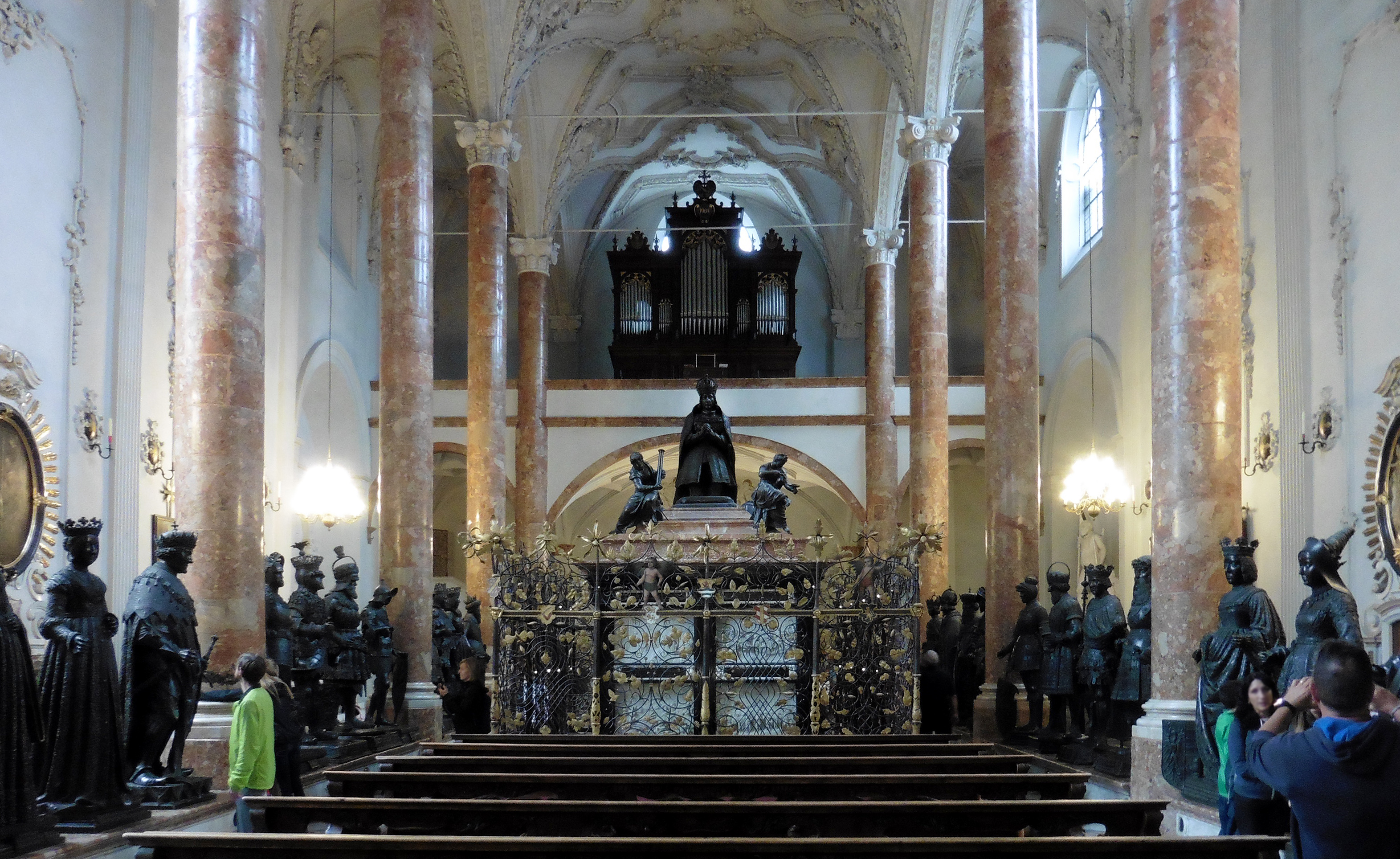 Grabmal von Kaiser Maximilian I. (1459–1519) in der Hofkirche in Innsbruck. Ansicht von Süden (vom Altar).